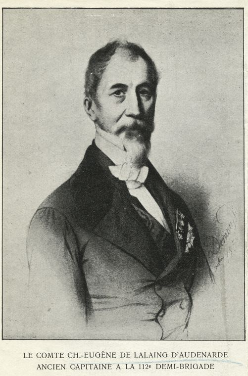 Charles-Eugène de Lalaing